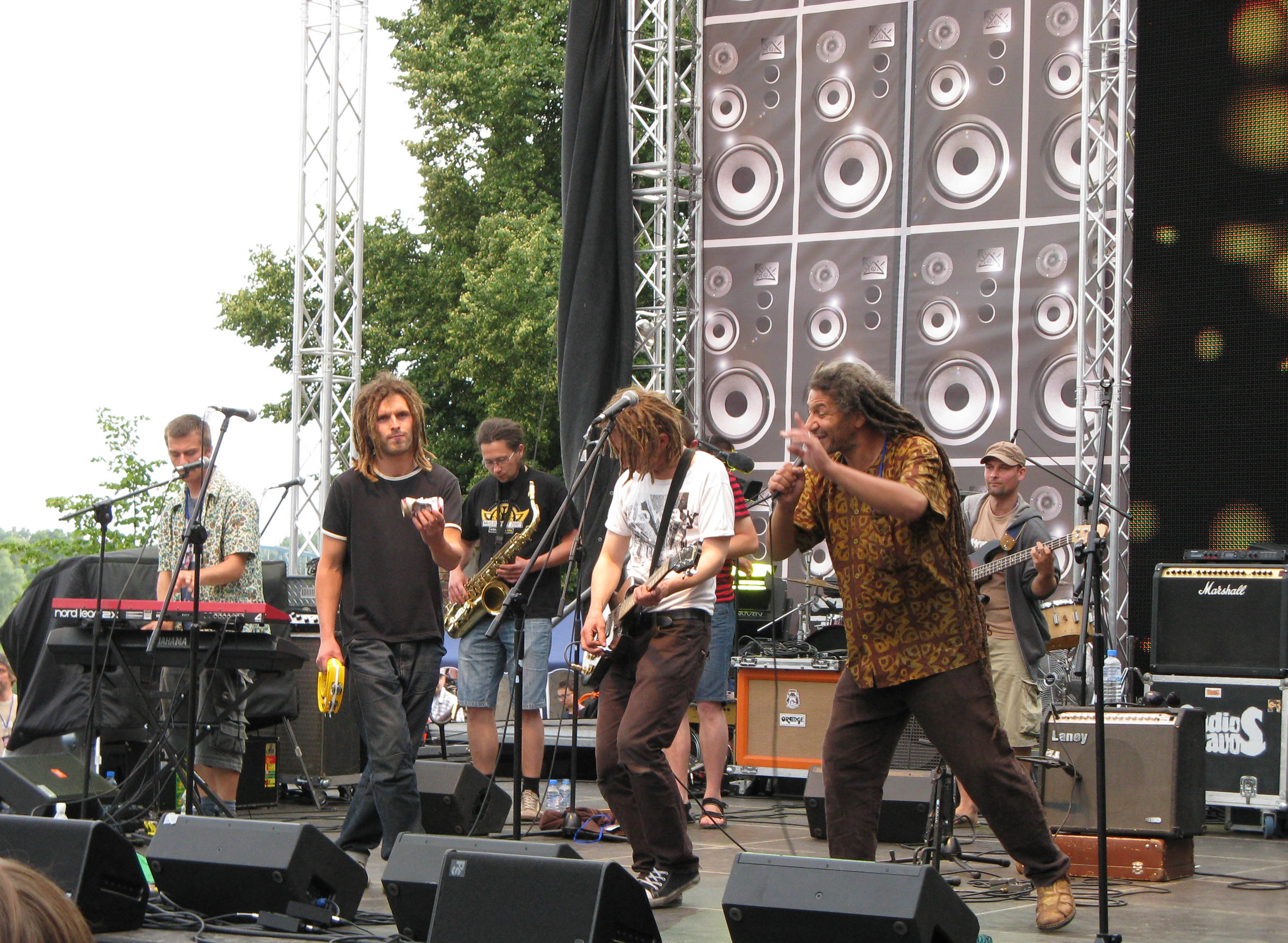 Gera Morales z zespołem Dubska na festiwalu Song Of Songs w Toruniu